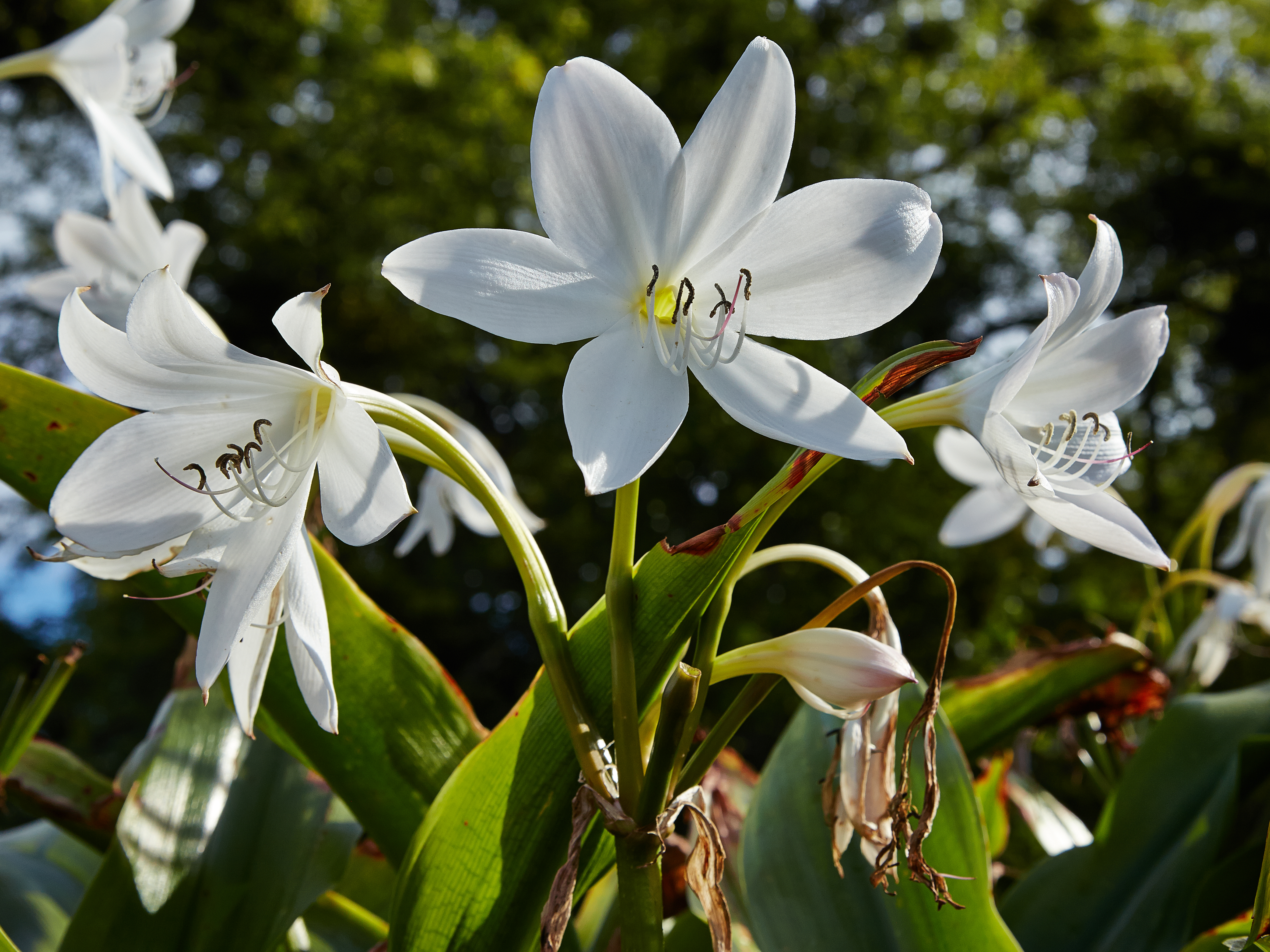 Crinum moorei identifierad med hjälp av befintlig skylt i Bergianska trädgården.